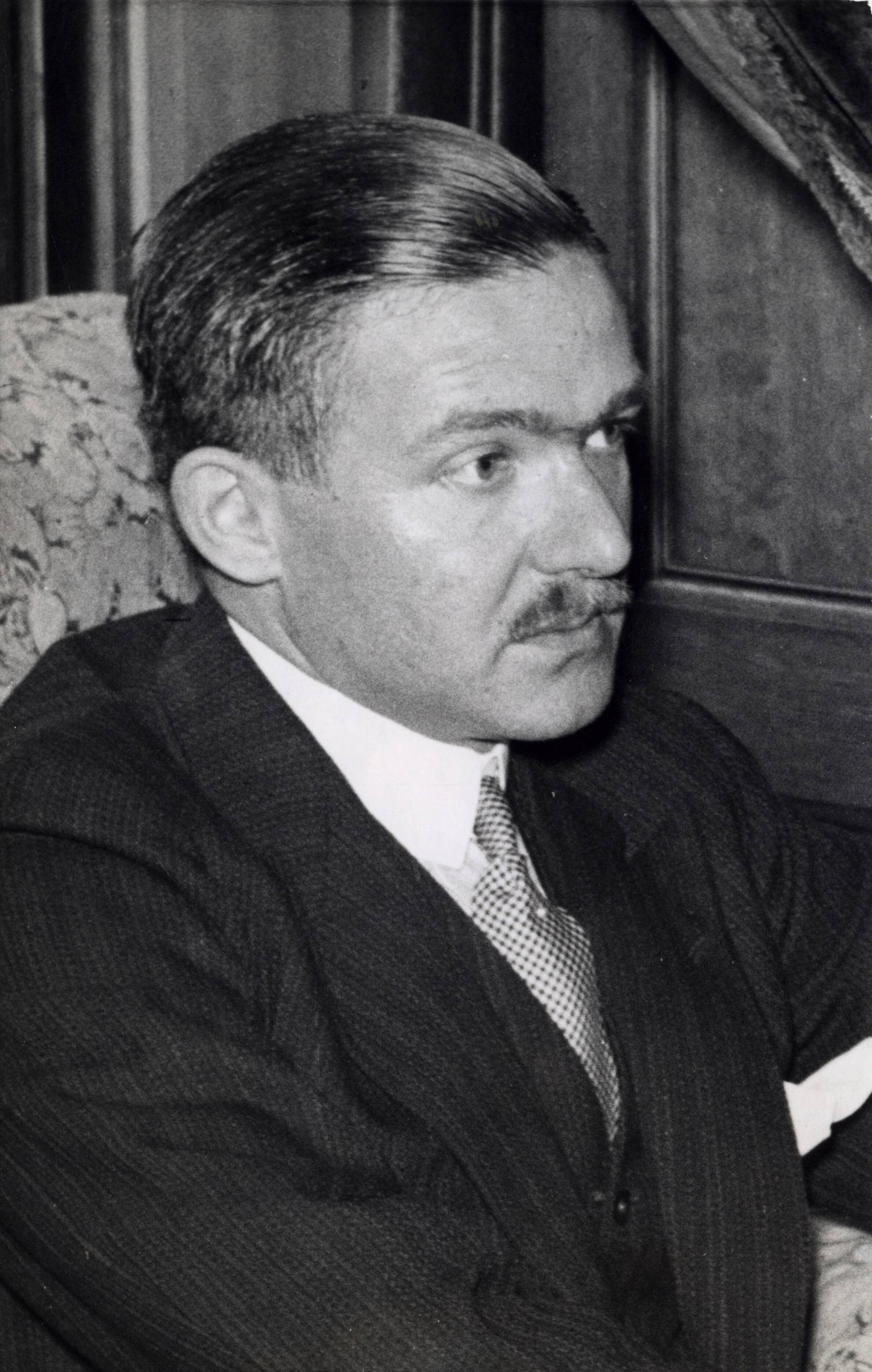 Johannes (Hans) Linthorst Homan (februari 1903 – november 1986) was een Nederlands politicus en diplomaat uit het geslacht Linthorst Homan. Hij was een van de drie oprichters van de omstreden Nederlandsche Unie. Foto: portret van J. Linthorst Homan, 1940 of eerder.